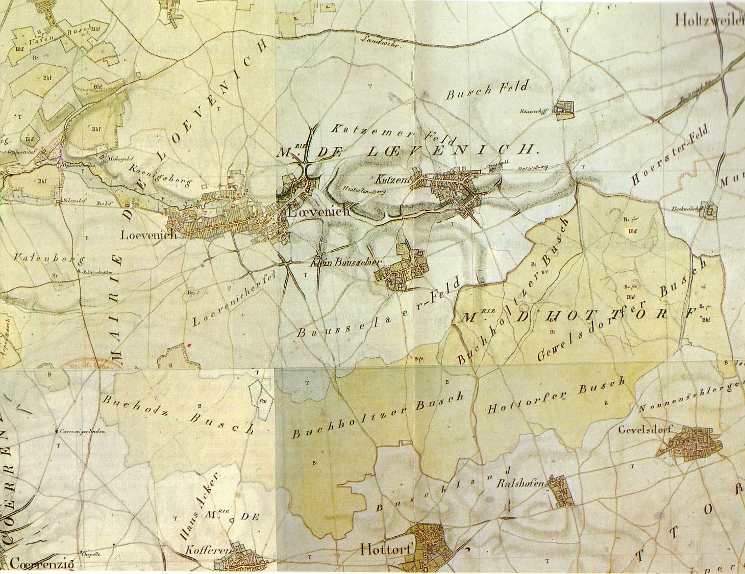 Map of Mairie de Loevenich (Germany); Kartenaufnahme des Rheinlands von Tranchot/Müffling, Blatt 57 (Aufnahme von 1806/07